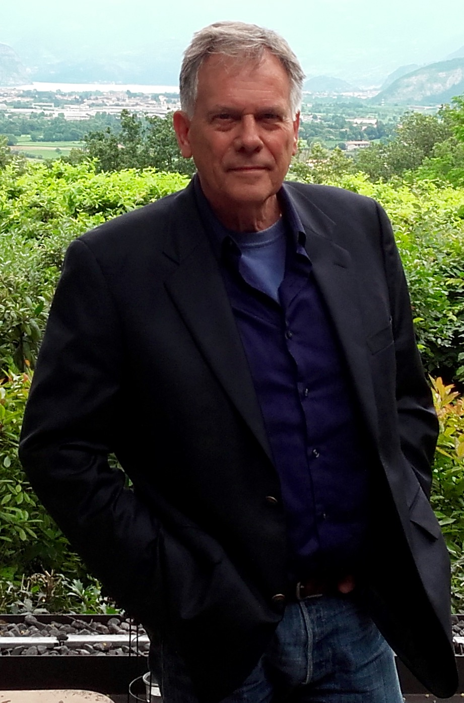 André Landzaat